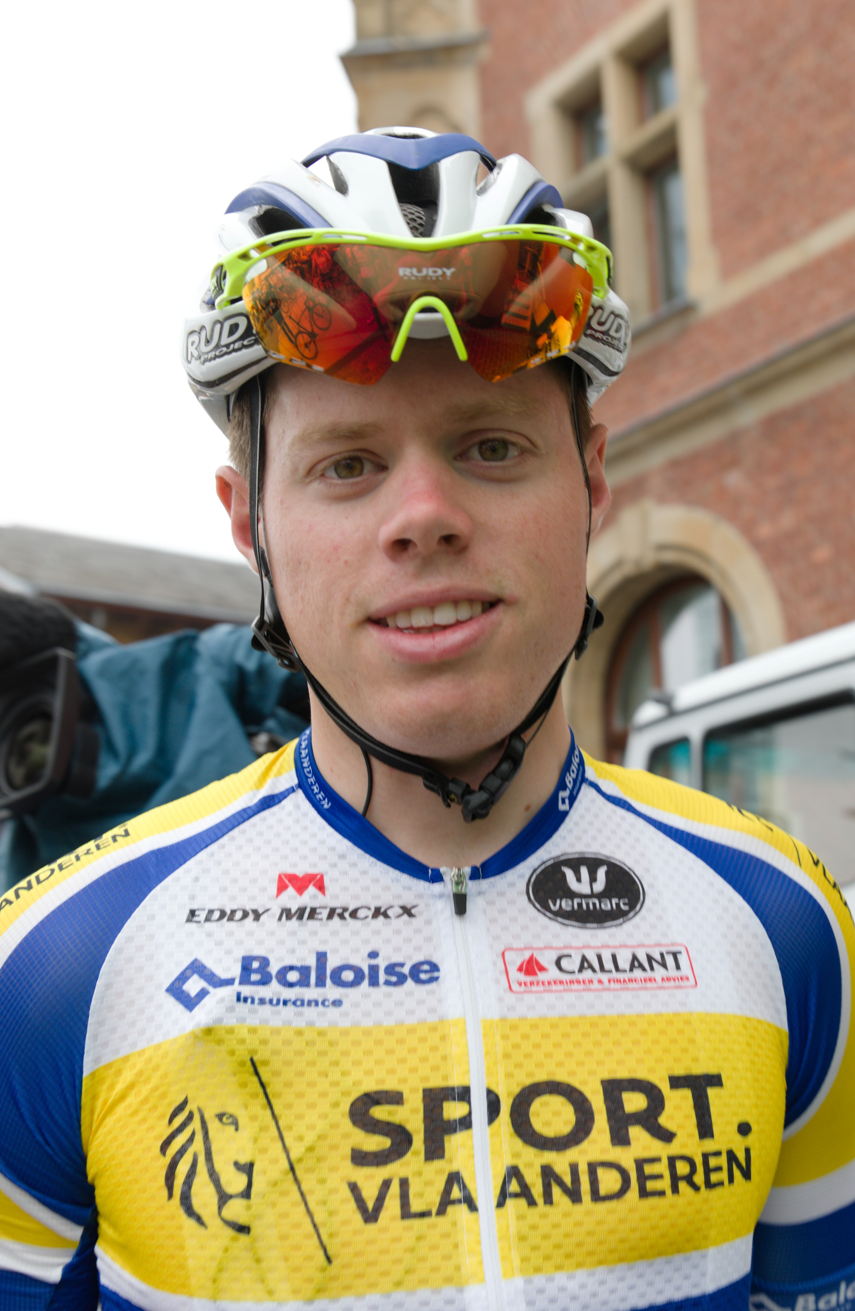 Jordi Warlop, belgischer Radsportler